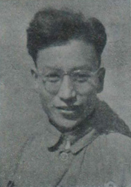 中國人民政治協商會議第一屆全體會議代表